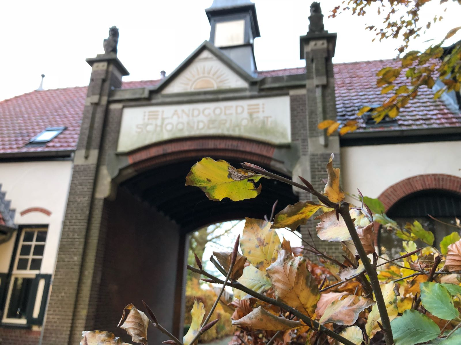 Landgoed Schoonderlogt was tijdens de Operatie Pegasus het hoofdkwartier van de US 101st Airborne Division.